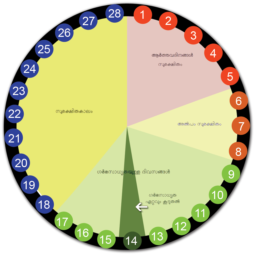 ആർ‌ത്തവചക്രത്തിന്റെ ചാർ‌ട്ട്, സുരക്ഷിതകാലവും